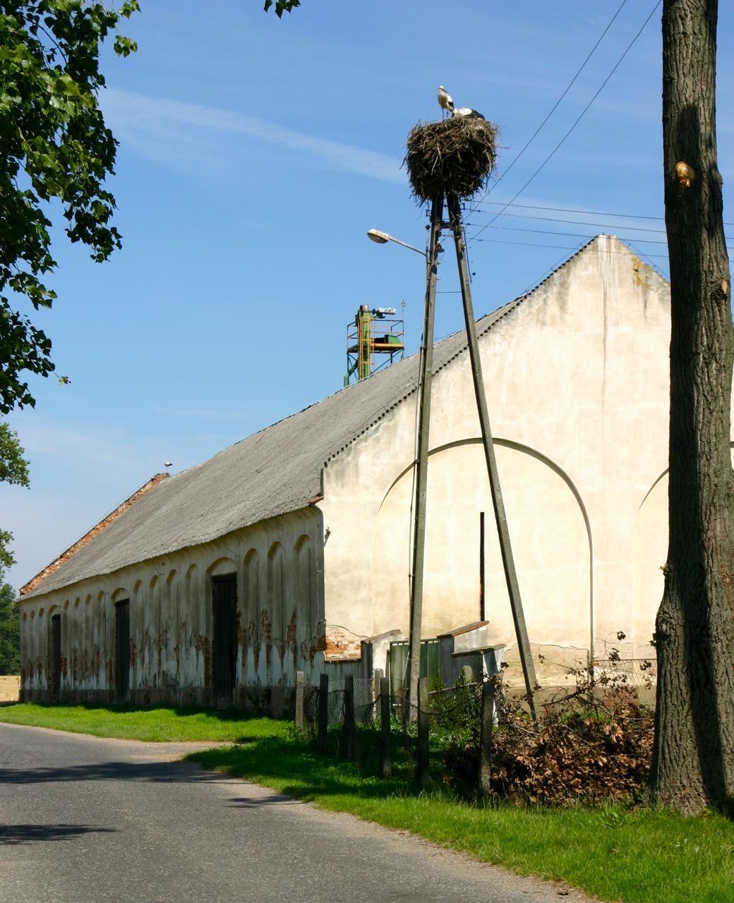 Pisarzowice (dodatkowa nazwa w j. niem. Schreibersdorf) – wieś w Polsce położona w województwie opolskim, w powiecie krapkowickim, w gminie Strzeleczki.